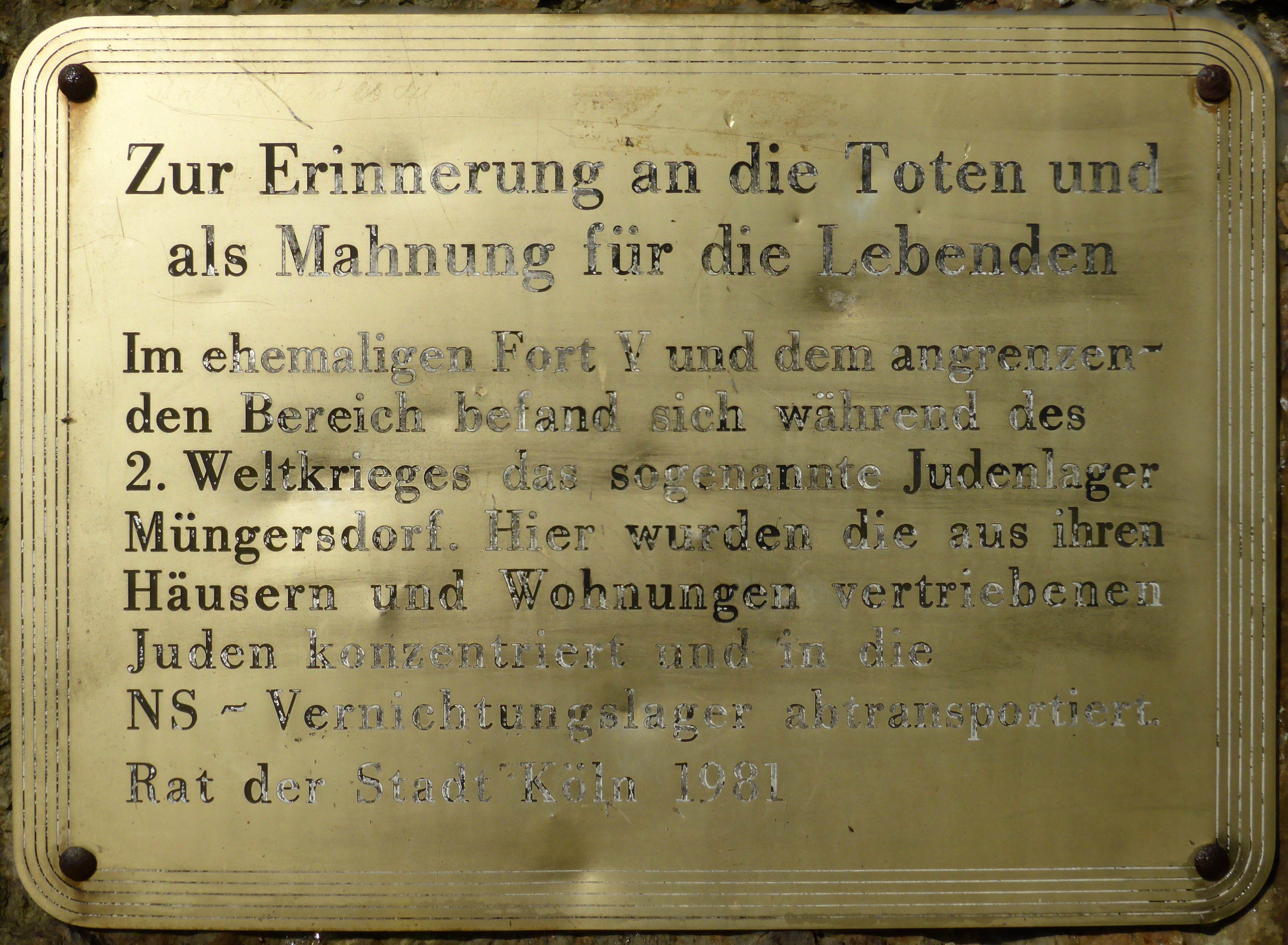 Festungsring Köln: Gedenkstein Fort V Müngersdorf.